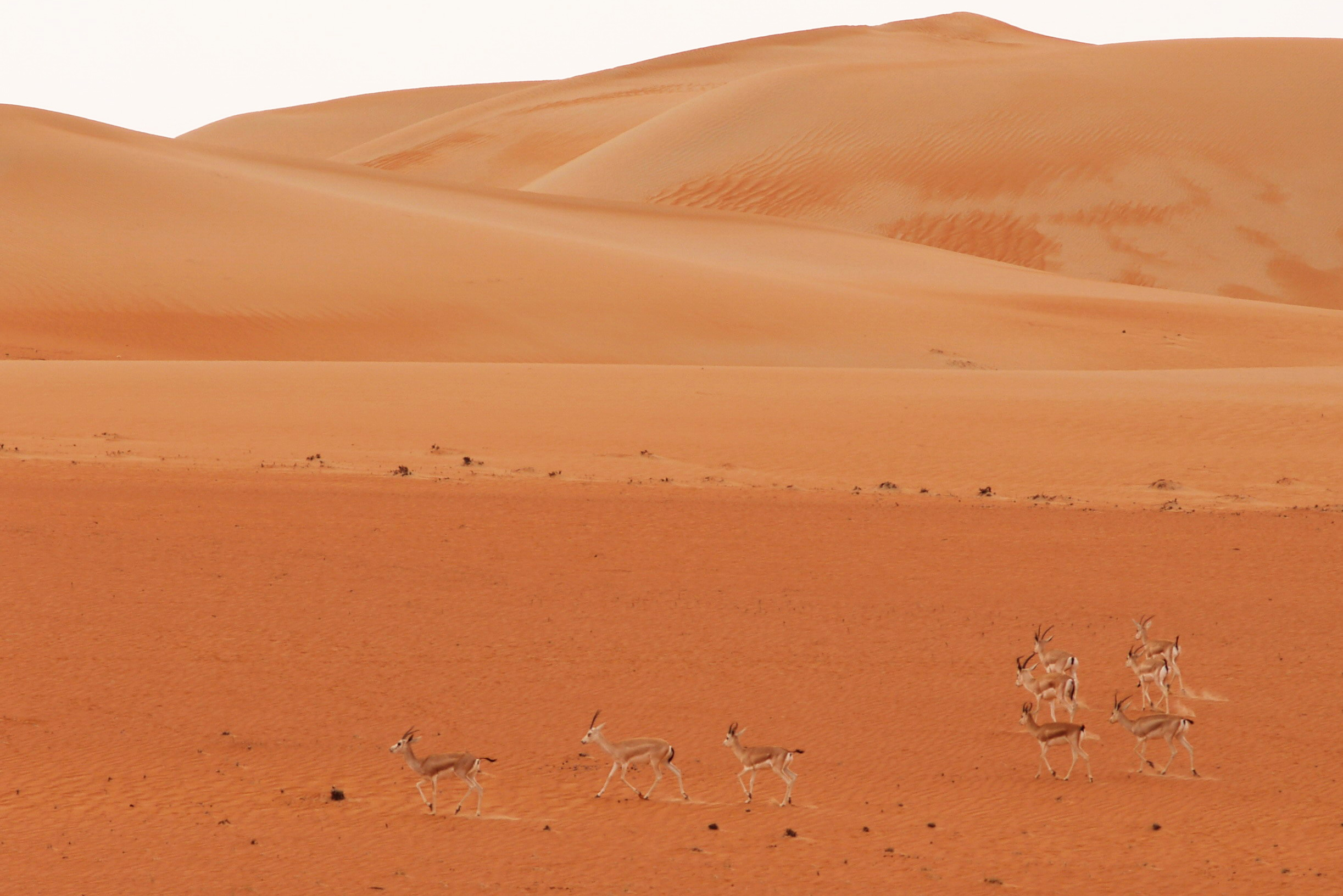 Désert peuplé de gazelles aux EAU